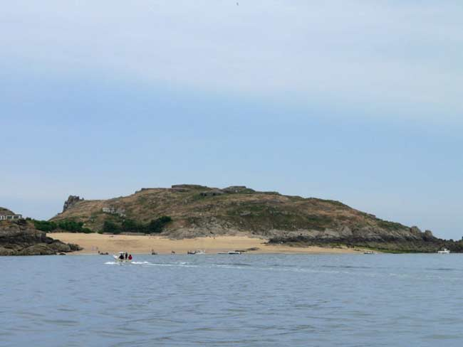 l'ile de Cézembre vue depuis la vedette